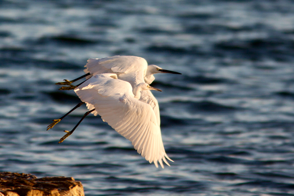 Garzette, Vendicari